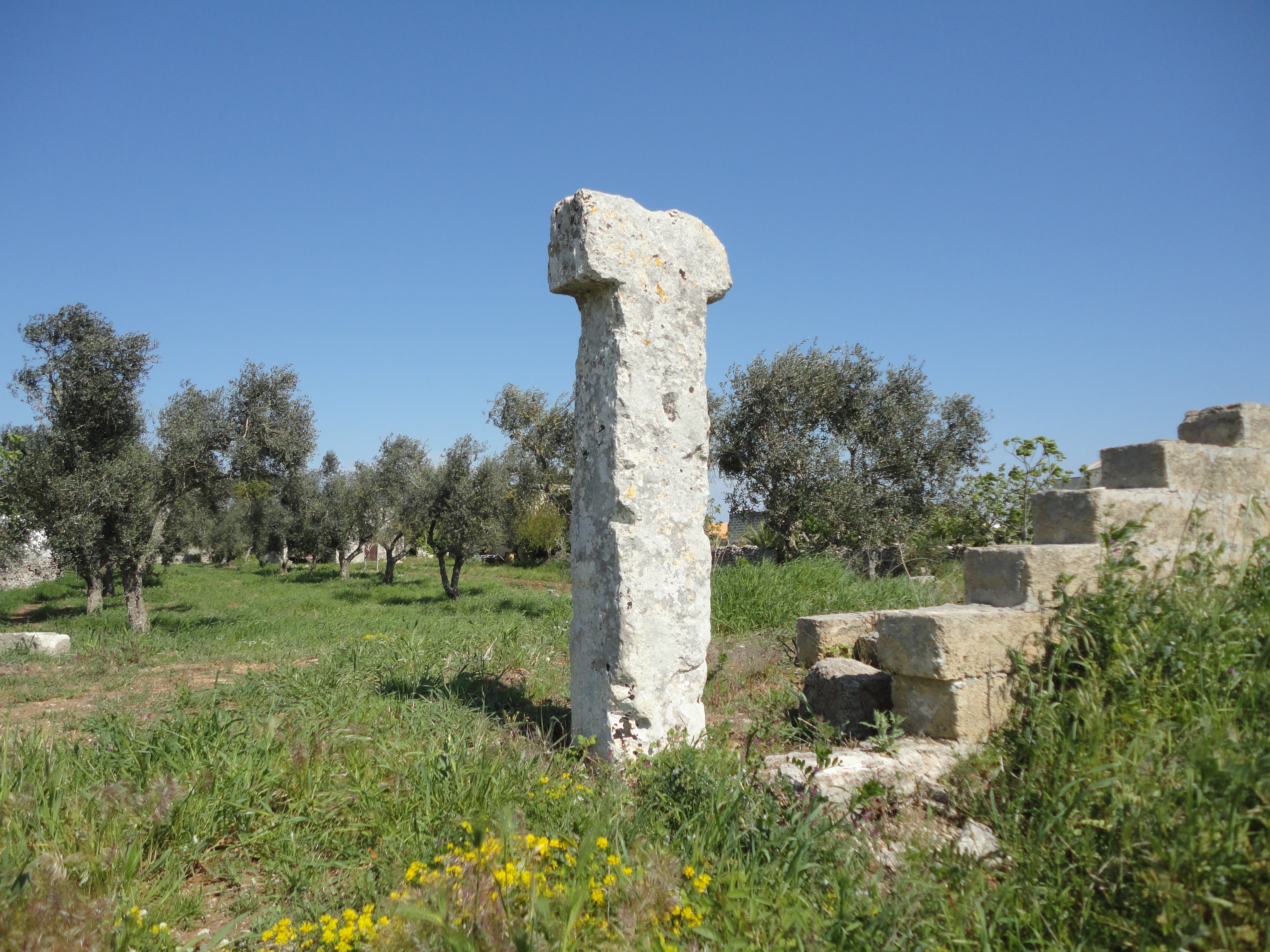 Menhir Vardare di Diso, Lecce, Puglia